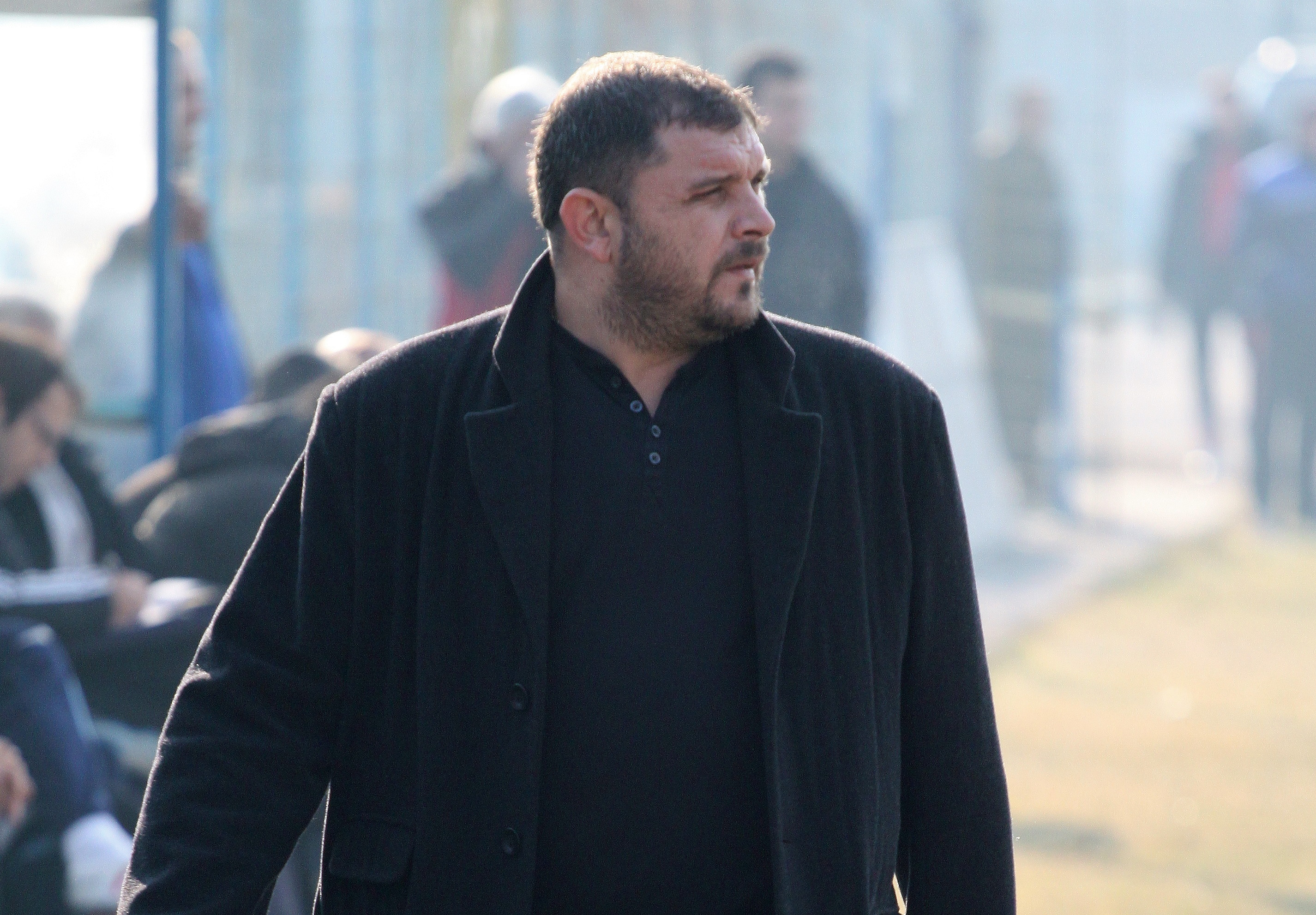 Методи Стойнев - бивш български футболист, понастоящем изп. директор на Септември Симитли.